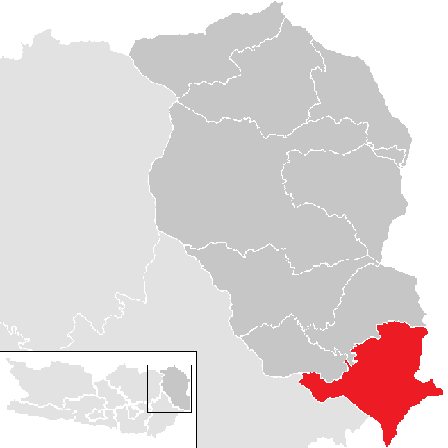 Bezirk Wolfsberg